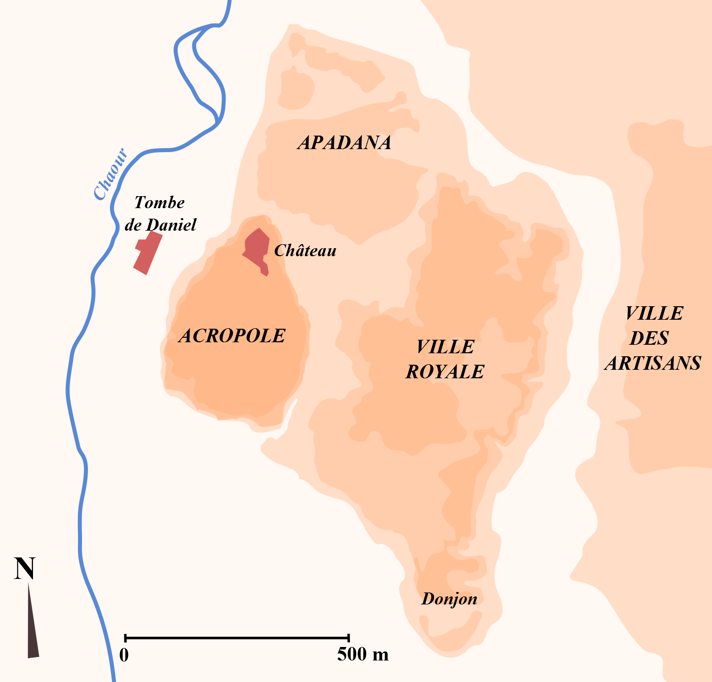 Les principaux tells et autres éléments marquants du site archéologique de Suse.